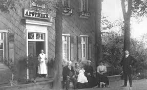 Fachwerkhaus Hirsch-Apotheke in der Hauptstraße 65 in Much. Rechts:Apotheker Eder